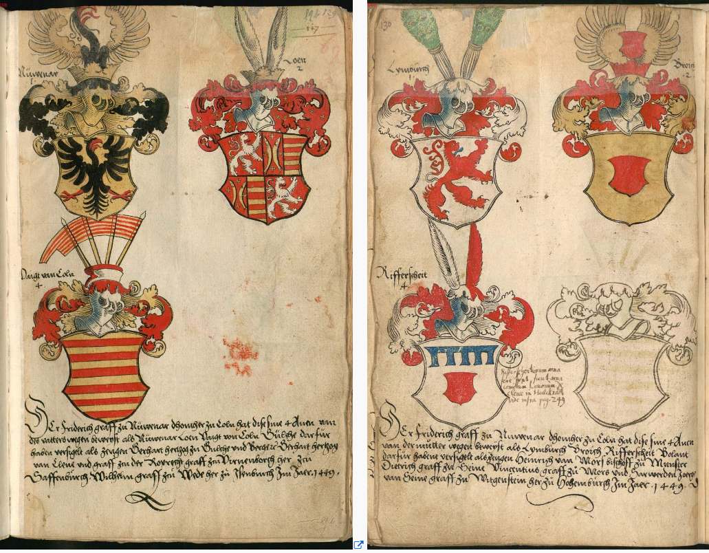 Wappen und Ahnenwappen des Friedrich von Neuenahr-Alpen (* um 1439; † 1468) anlässlich seiner Aufschwörung zum Kölner Domherren 1449.png